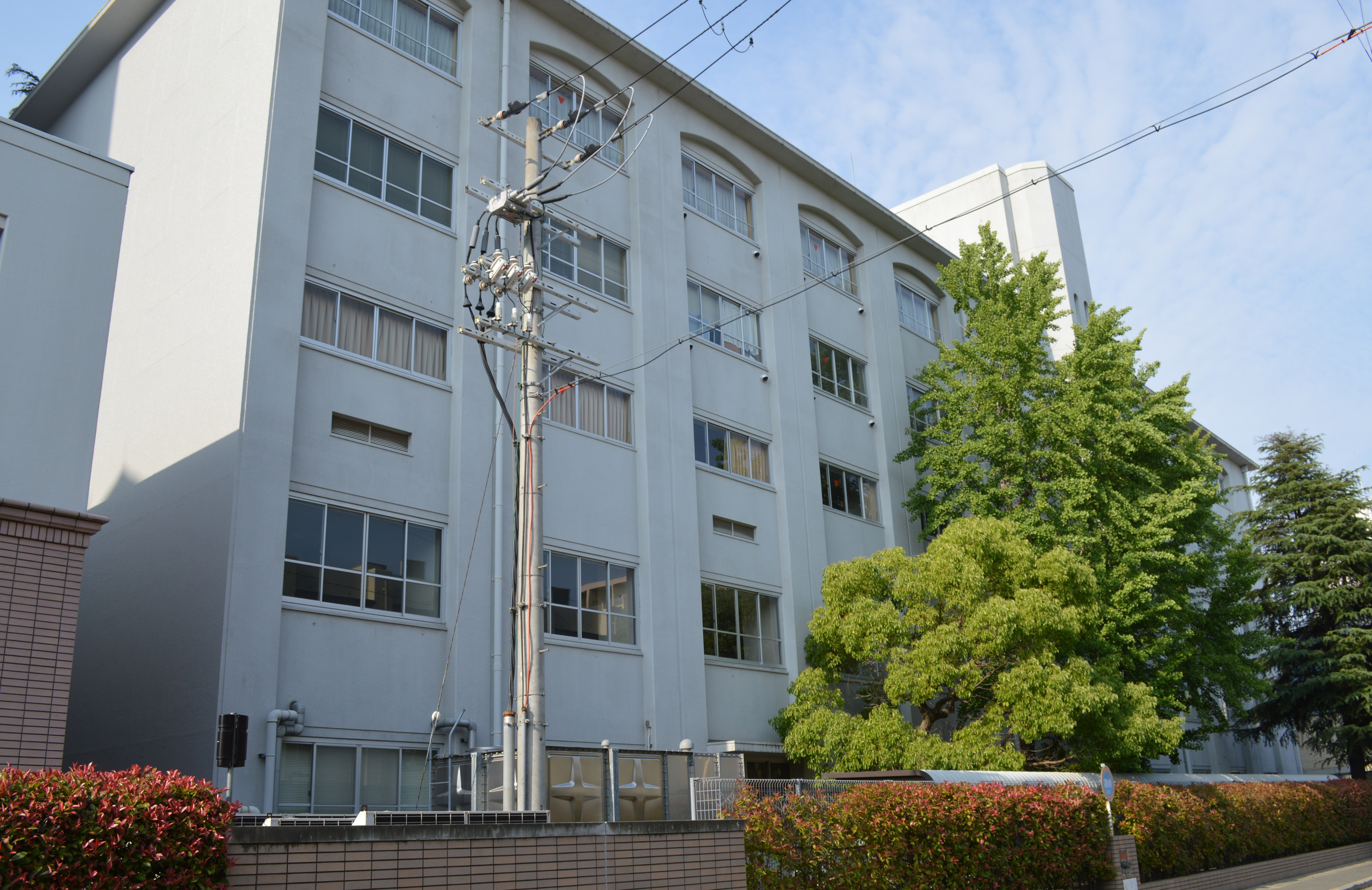 大阪市城東区古市 大阪信愛女学院短期大学城東キャンパス 子ども教育学科建物